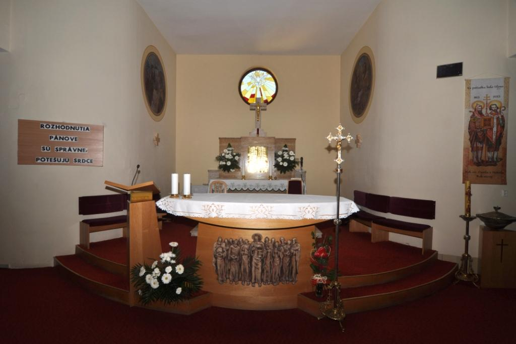 Interiér Kostola sv. Martina